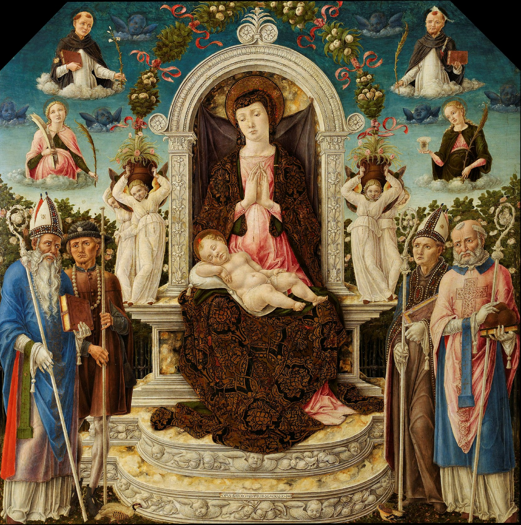 Vedi titolo